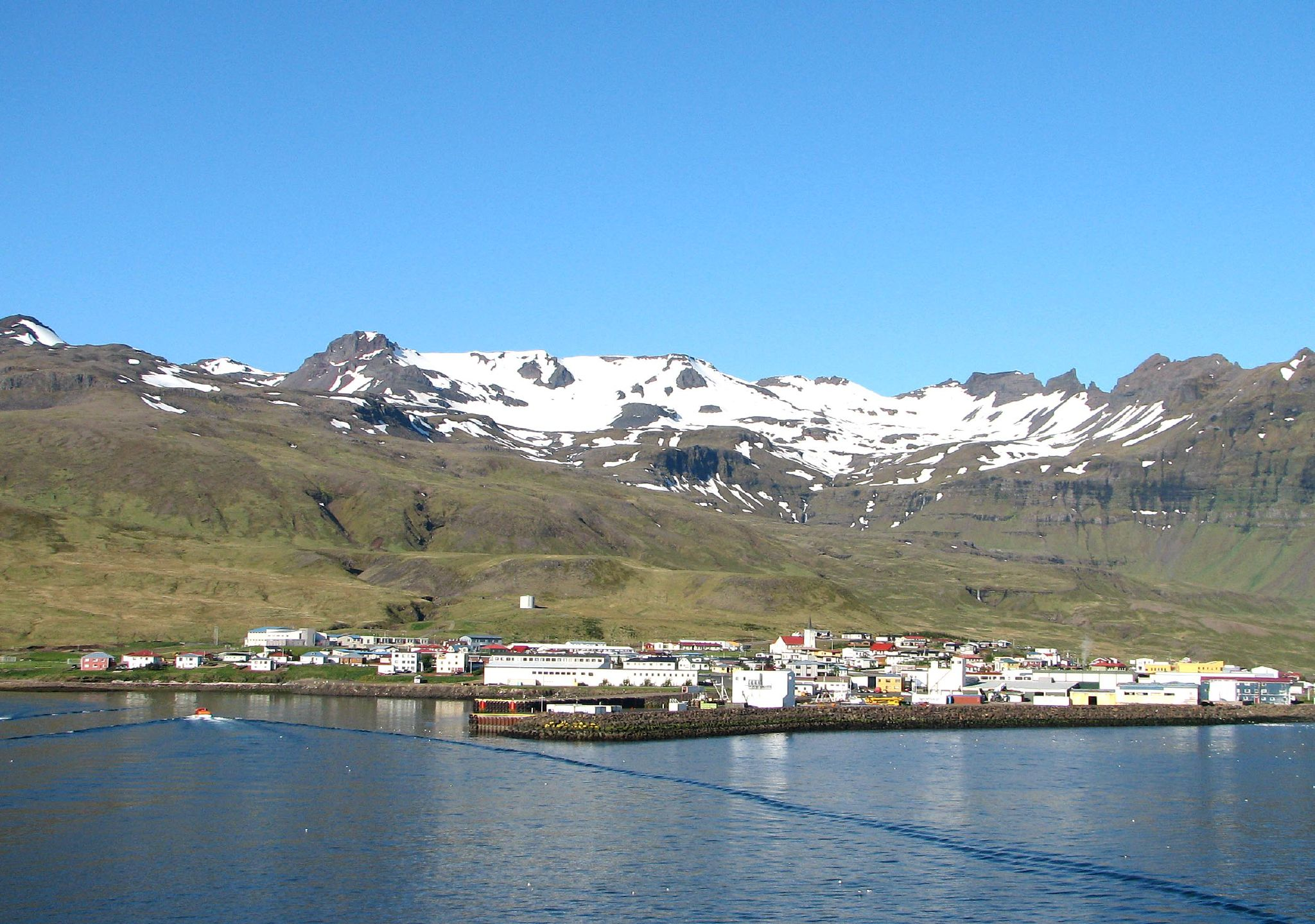 Grundarfjørdur 01